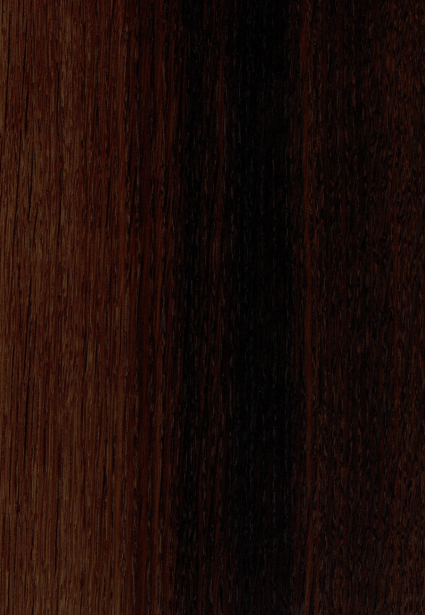 Spessarteiche Eiche mit Salmiak geräuchert